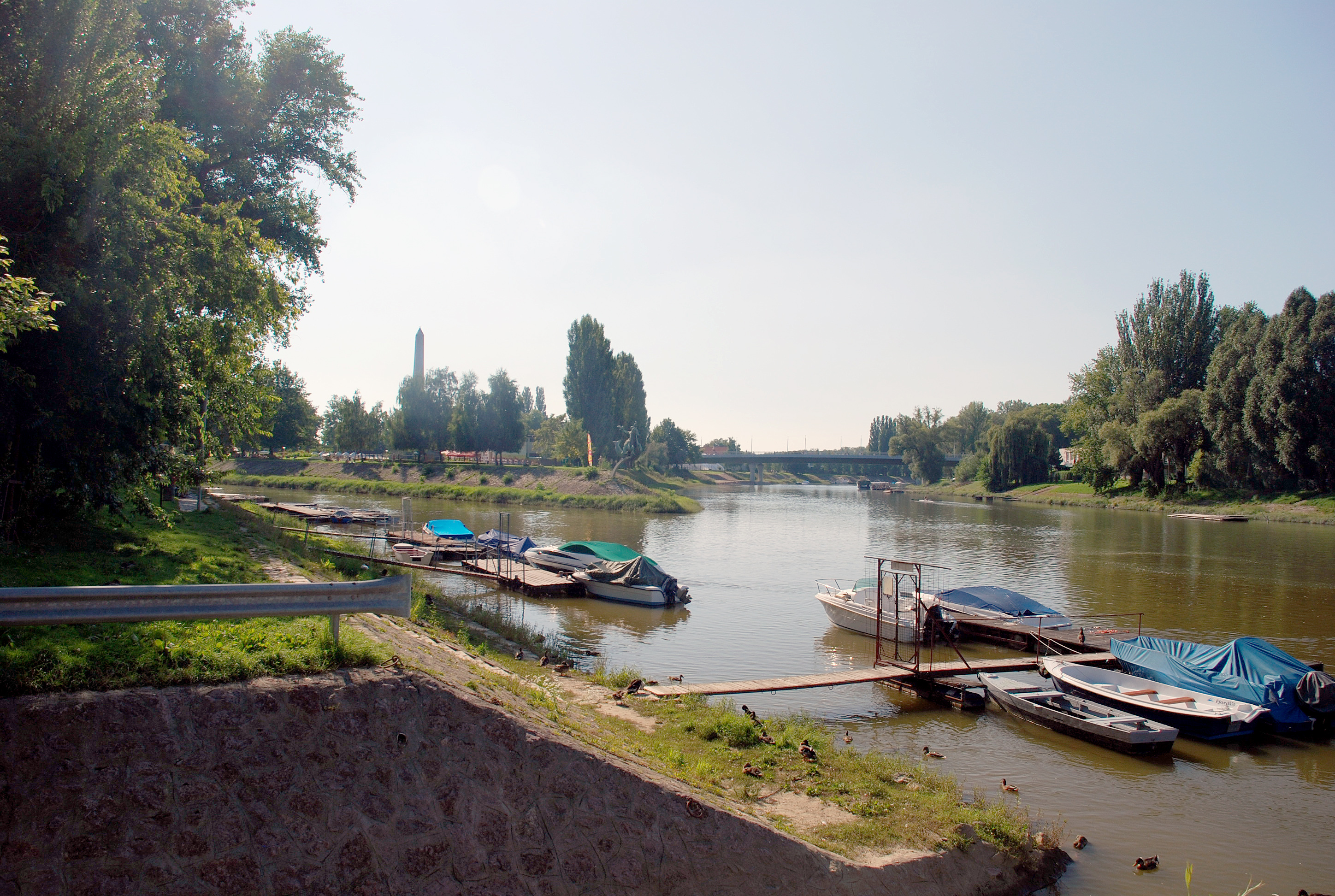 Györ, Ungarn: Mündung der Raab (von links kommend) in die Donau (Mosoni-Duna)